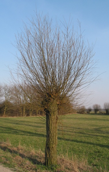 Kopfweide